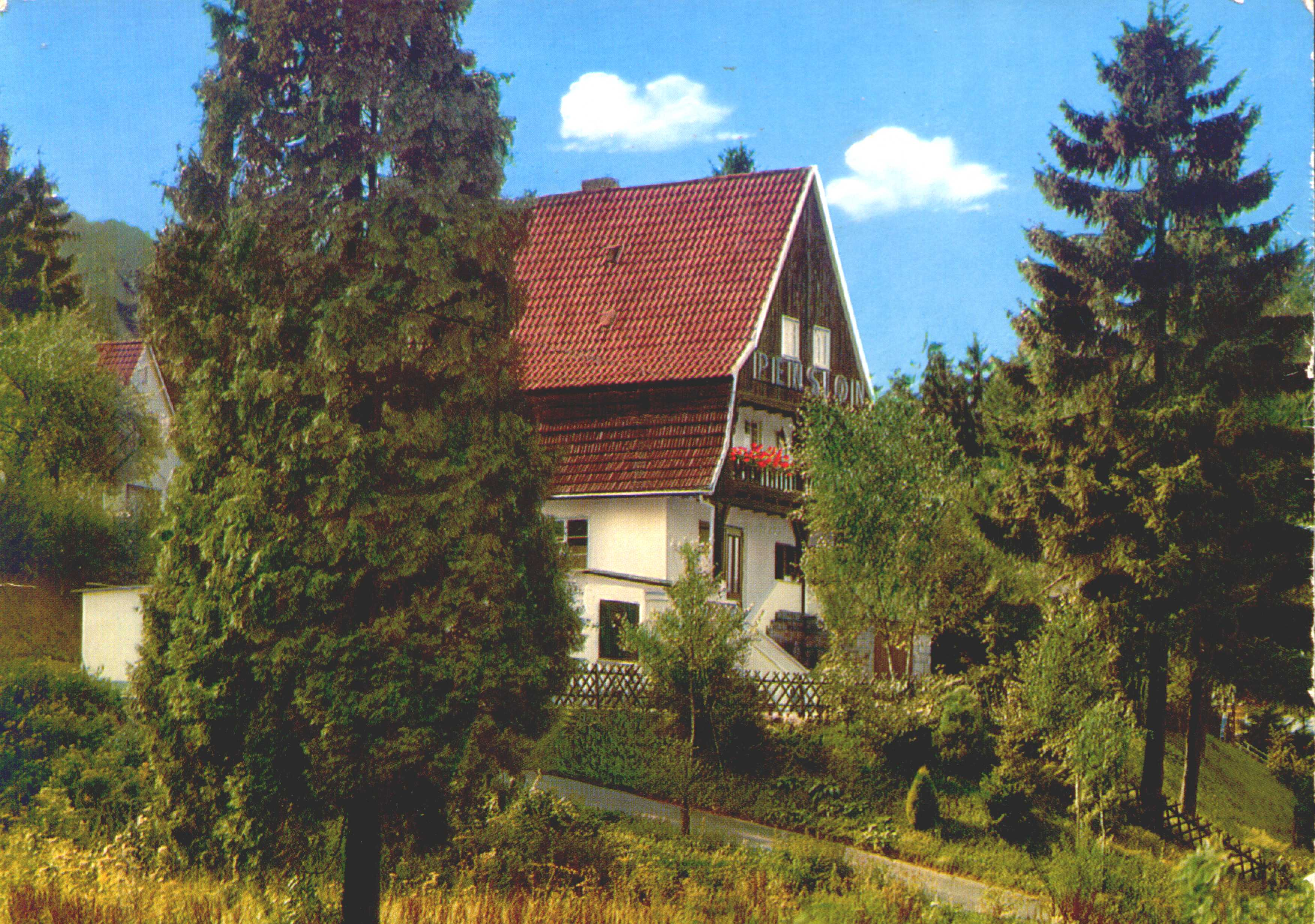 Bergfried, Herchen-Bahnhof